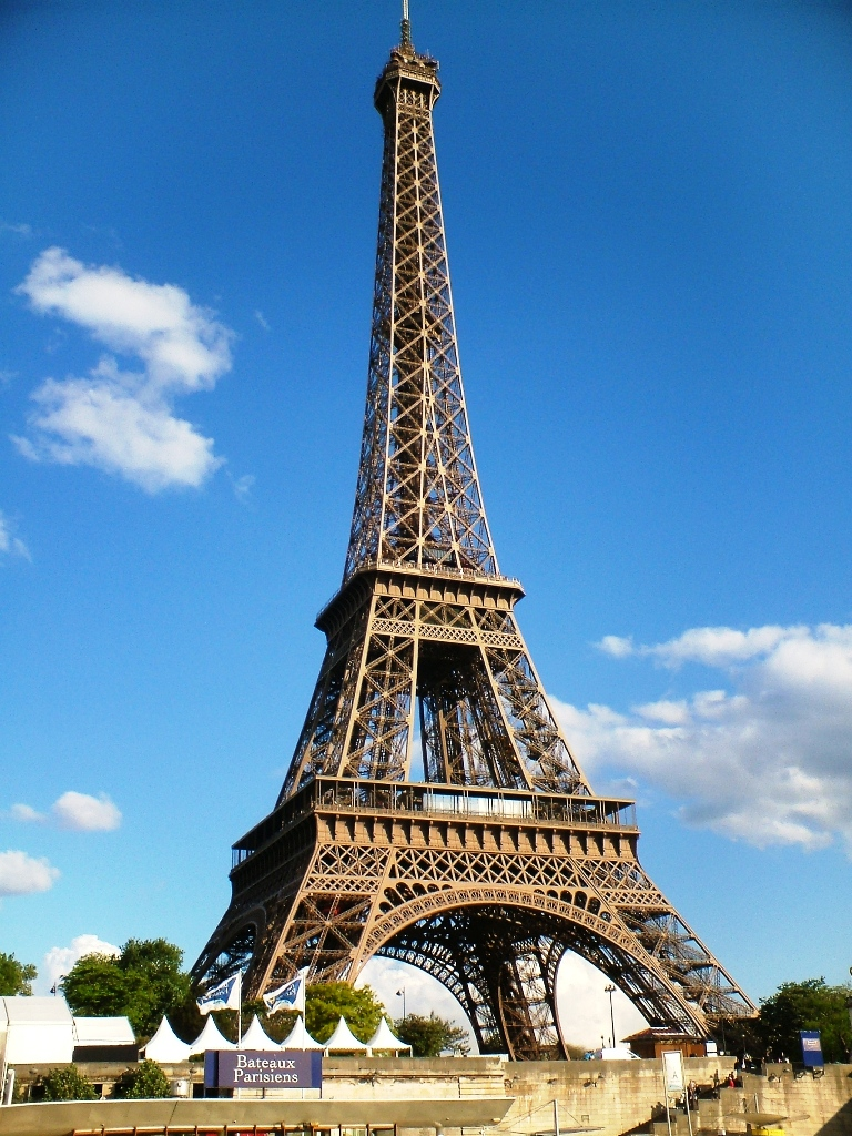 Eiffelova věž.